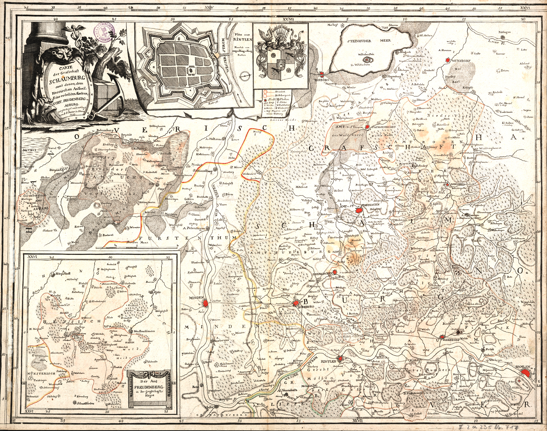 Carte der Grafschaft Schaumburg samt denen, dem Hessischen Antheil, Einverleibten Aemtern, Ucht, Feudenberg u. Auburg / verfertiget und verlegt von J. J. Müller